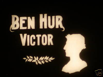 Première version de Ben-Hur au cinéma. un film Kalem (1907), réalisé par Sidney Olcott.